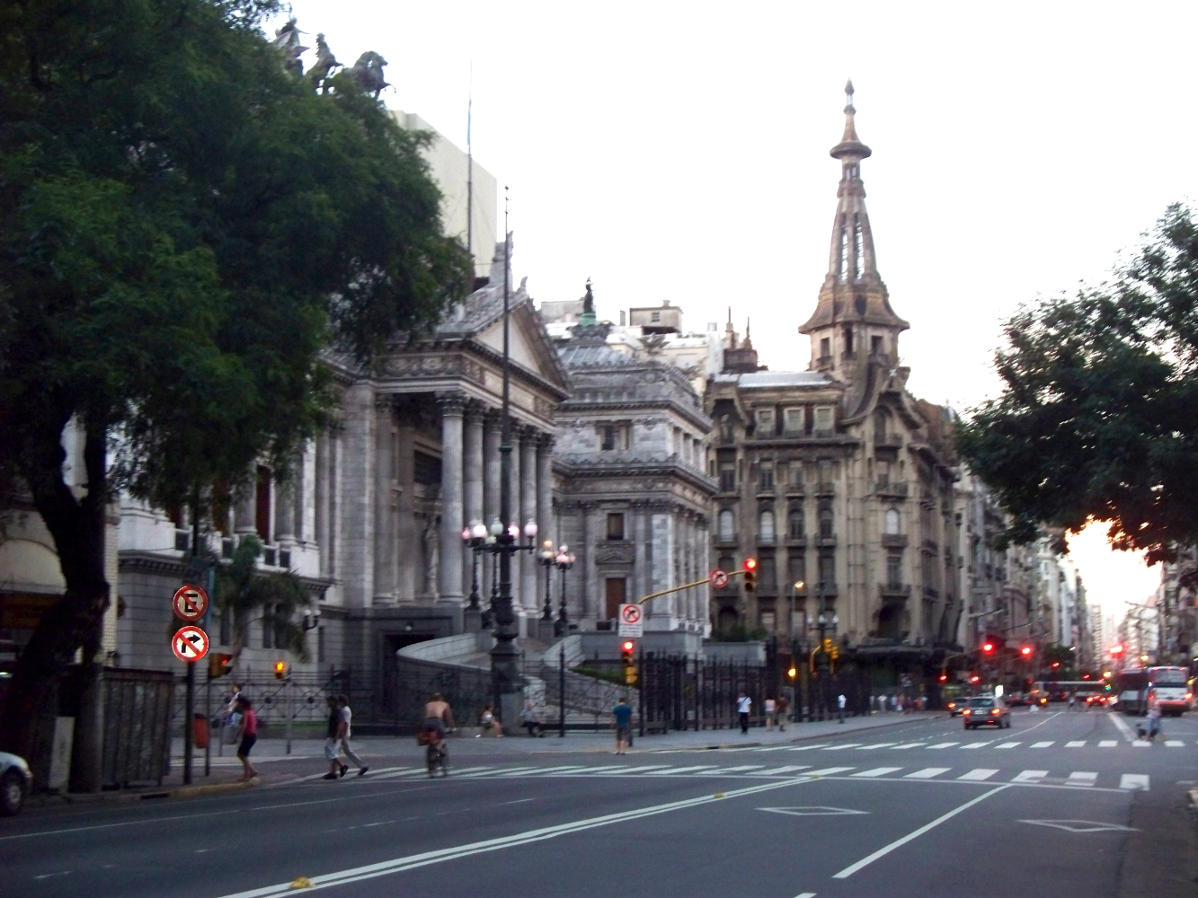 Frente de la confiteria "El molino" y a la izquierda el ingreso al congreso nacional